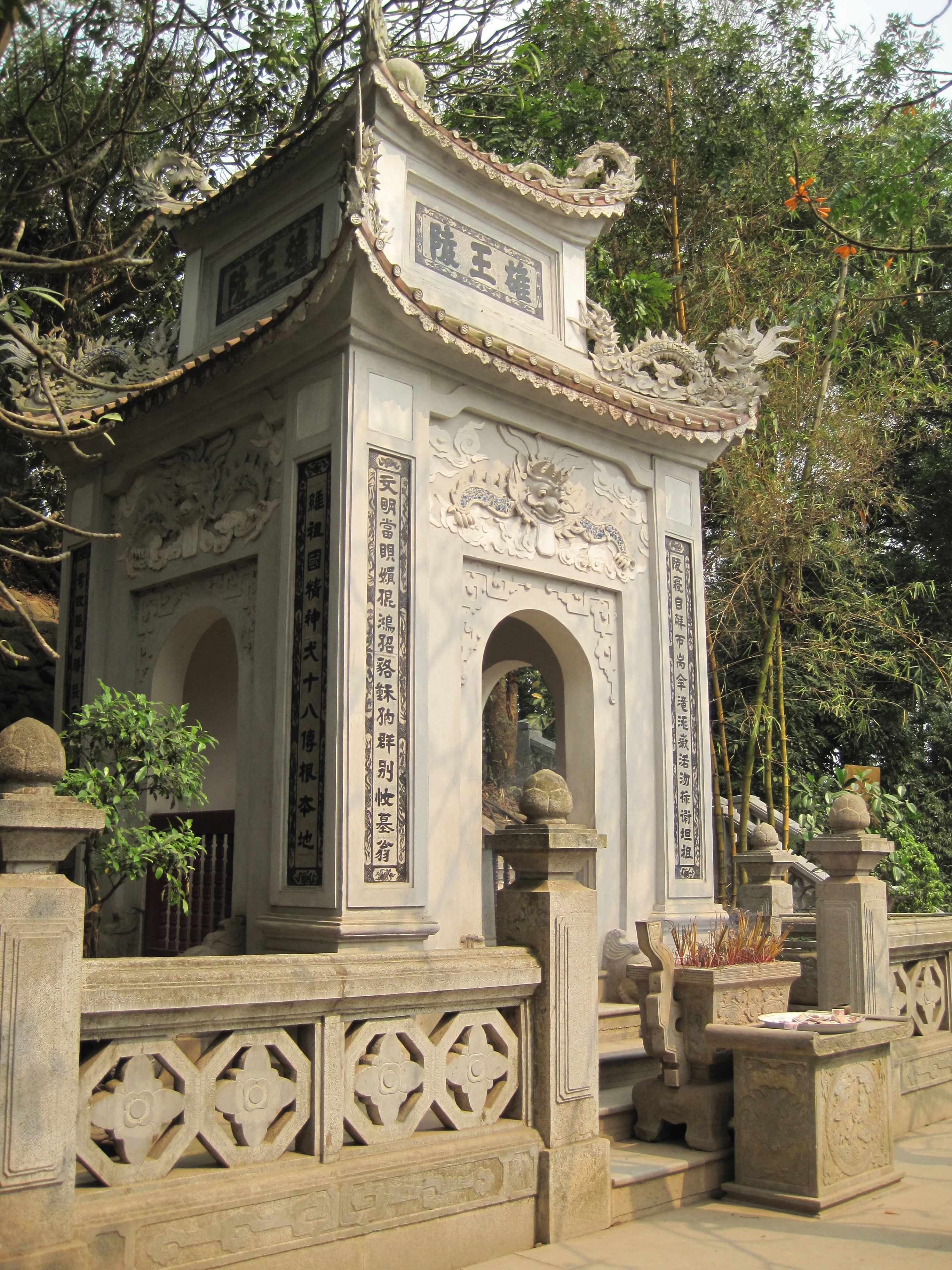 Lăng vua Hùng (xây vào năm 1870) ở đền Hùng, Việt Trì, Phú Thọ.